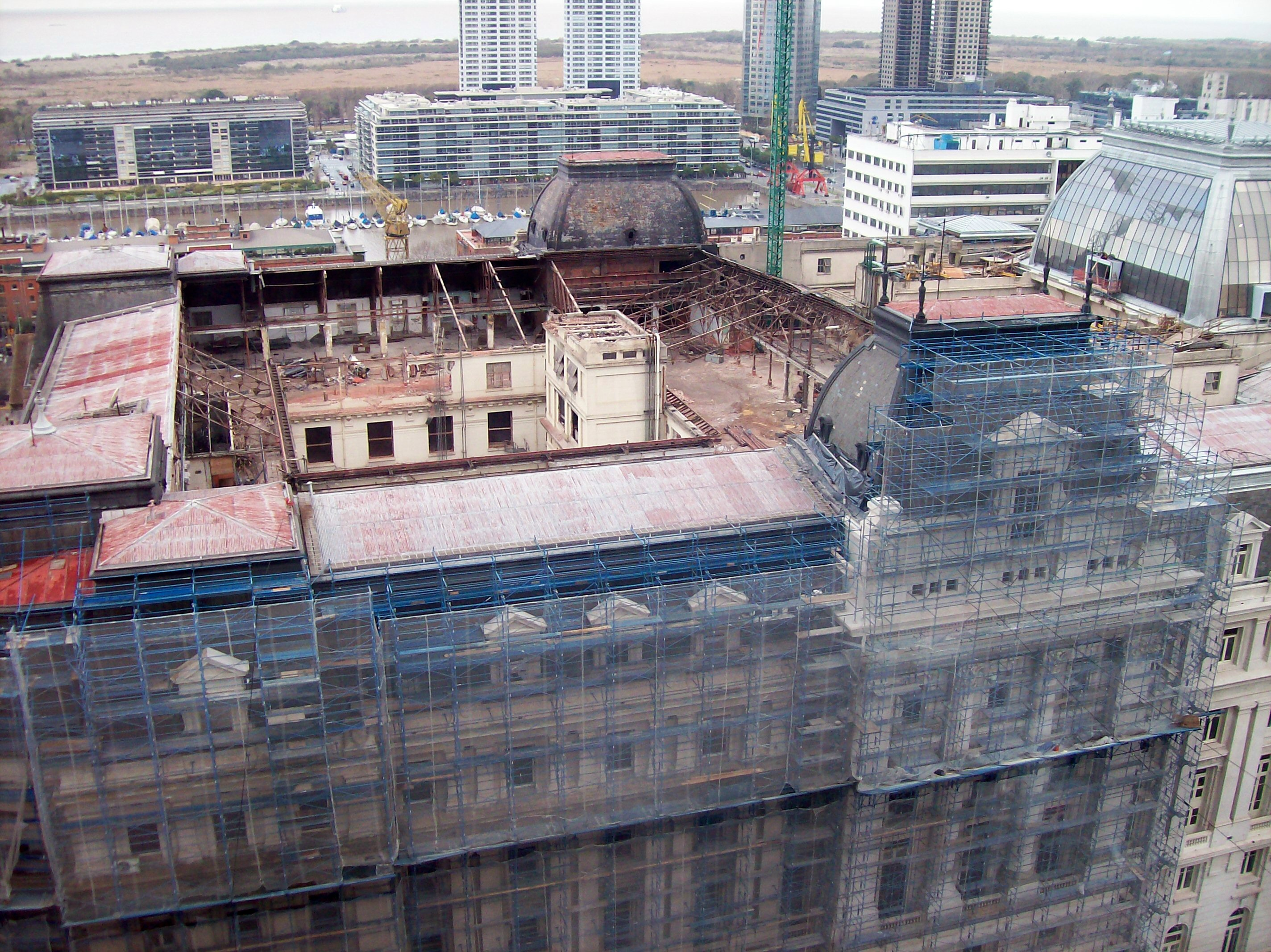 Palacio de Correos, en el barrio de San Nicolás, Buenos Aires, Argentina, visto desde el techo del edificio Comega, mientras lo modificaban en 2010. La cúpula de vidrio es la actual